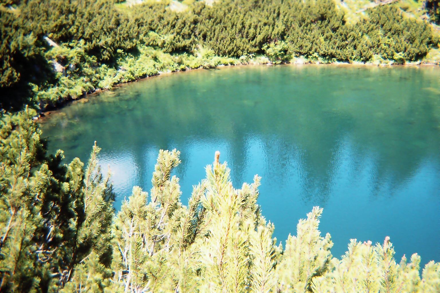 Lacul Sureanu (1732m asl) in Șureanu Mountains, part of Parâng Mountains